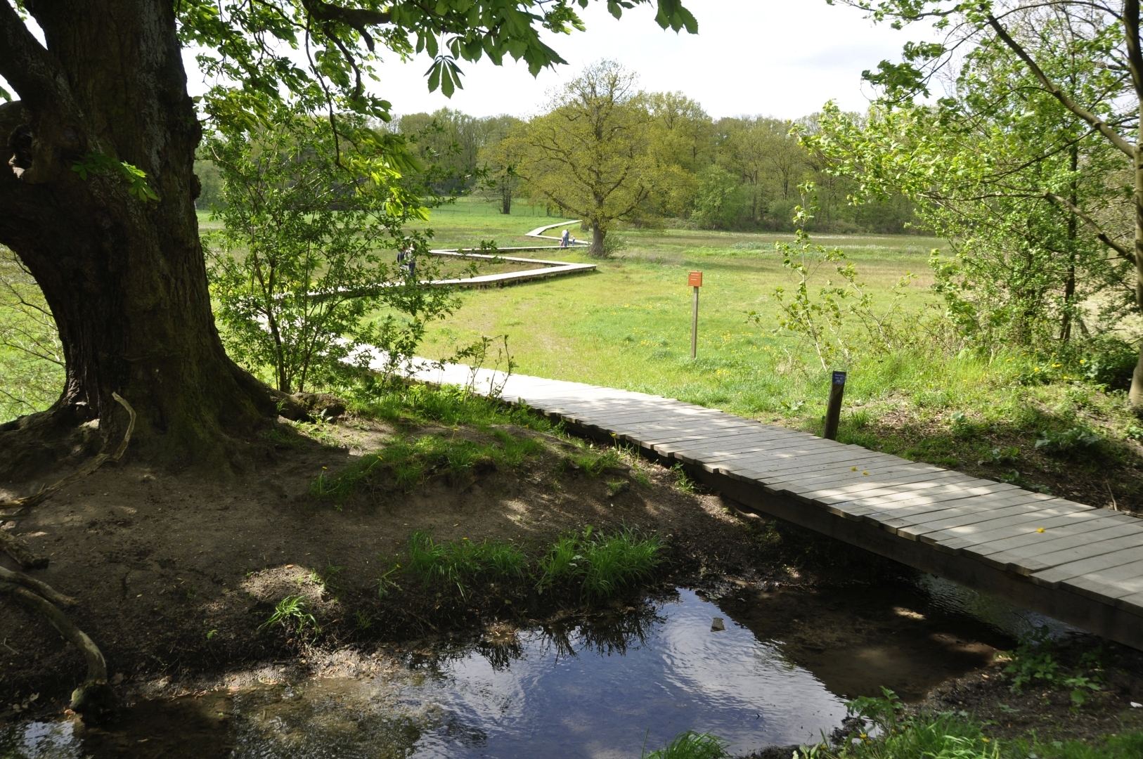 Renkums Beekdal kort nadat het naast gelegen industriegebied teruggegeven was aan de natuur en de bezoekers via dit vlonderpad het gebied in konden